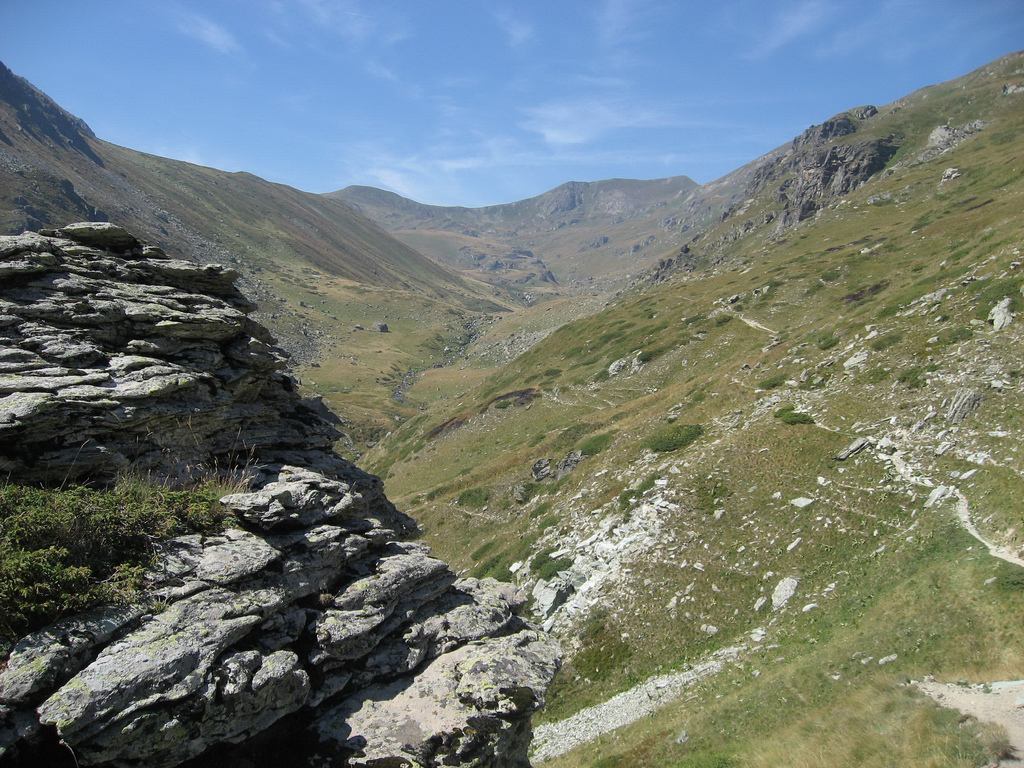 Боговинската река на Шар Планина на патот кон полошката котлина